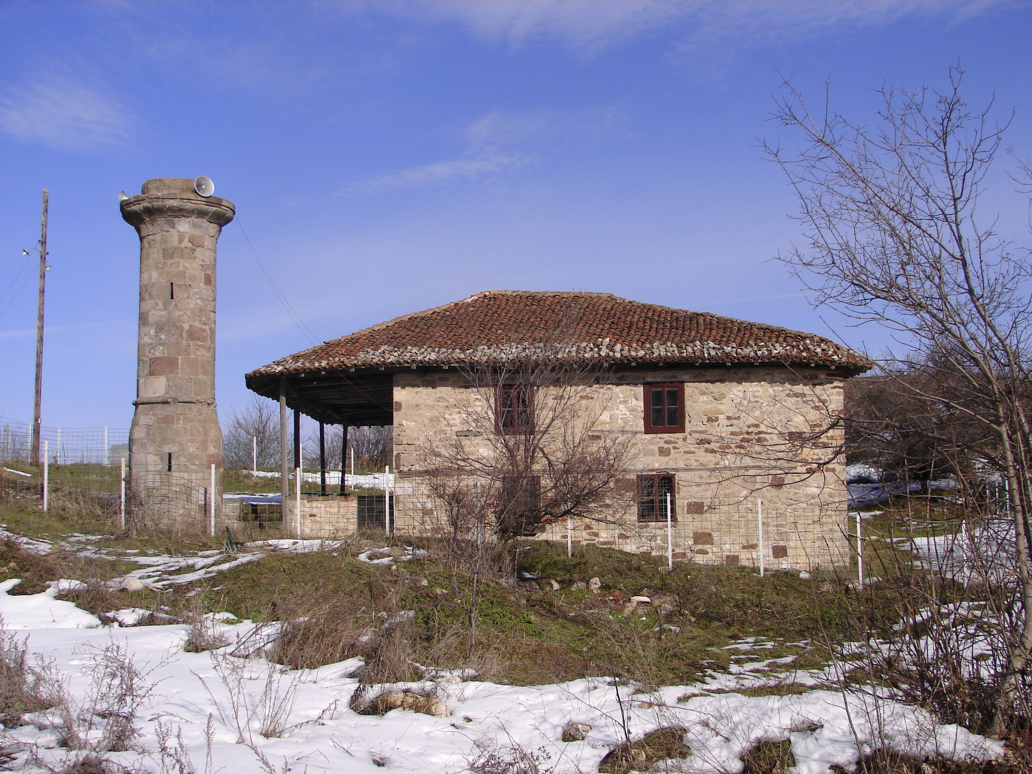 Xhamia në Artanë